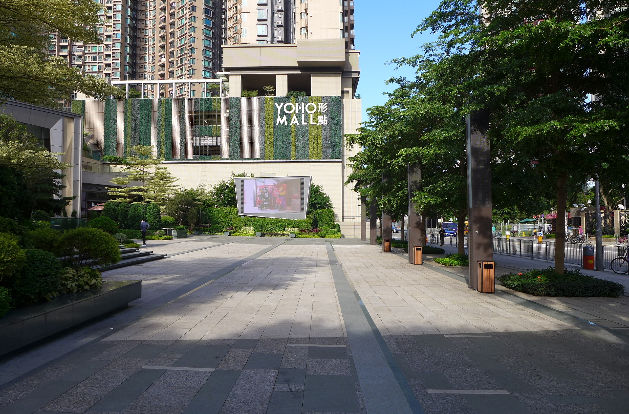 YOHO Mall Outside Plaza